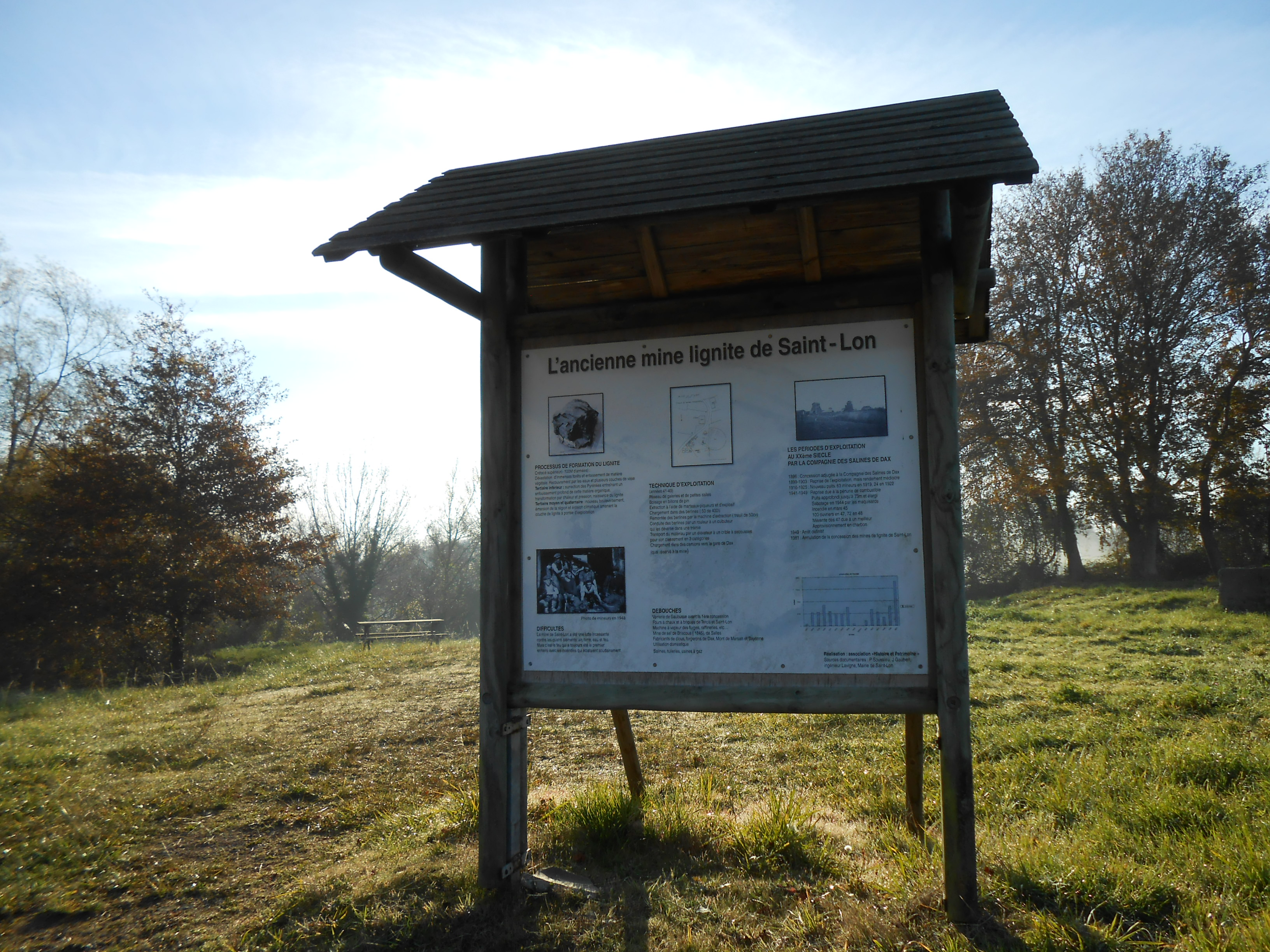 Saint-Lon-les-Mines près de l'ancienne mine de lignite, France.